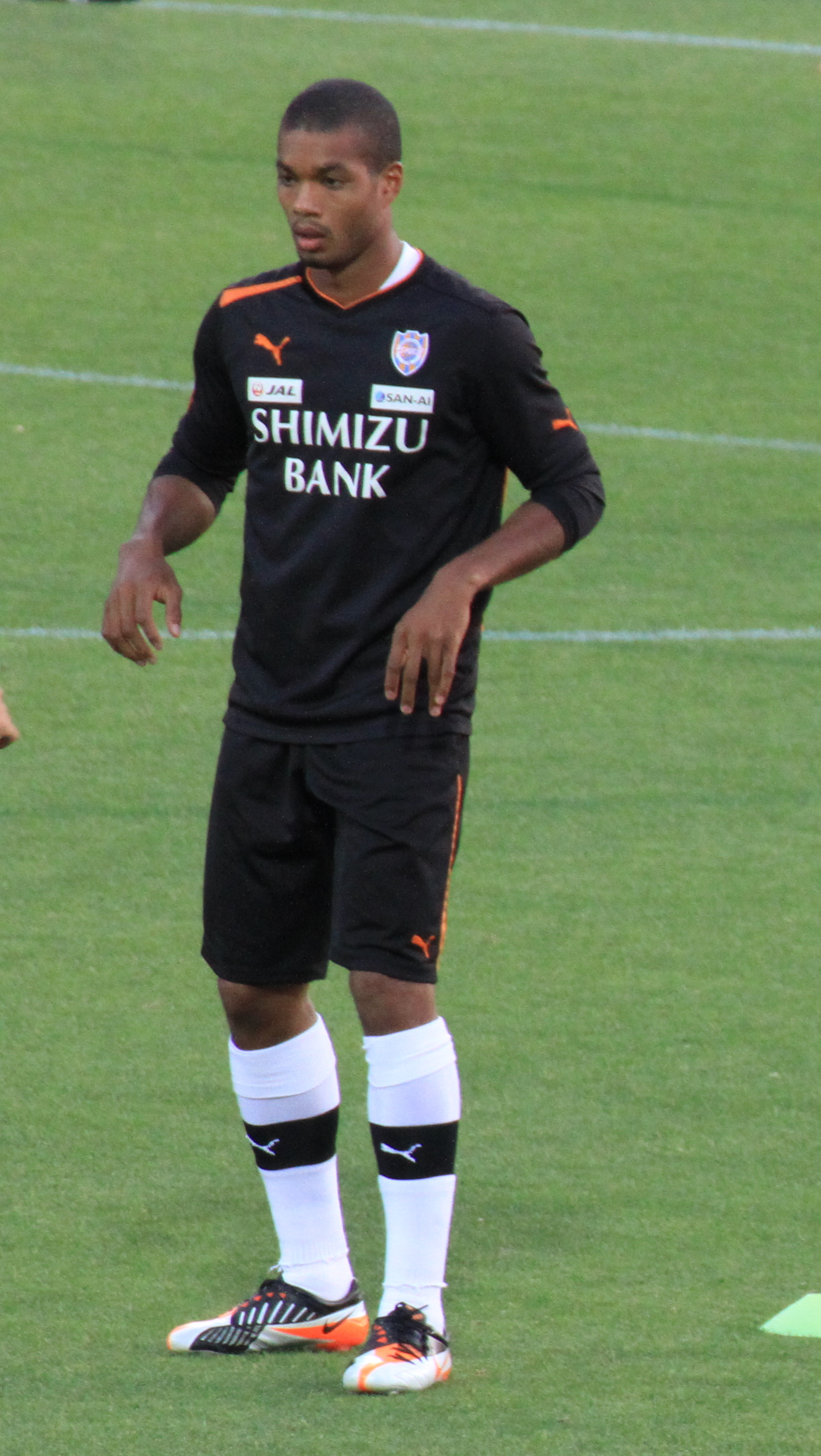 Shimizu S-Pulse